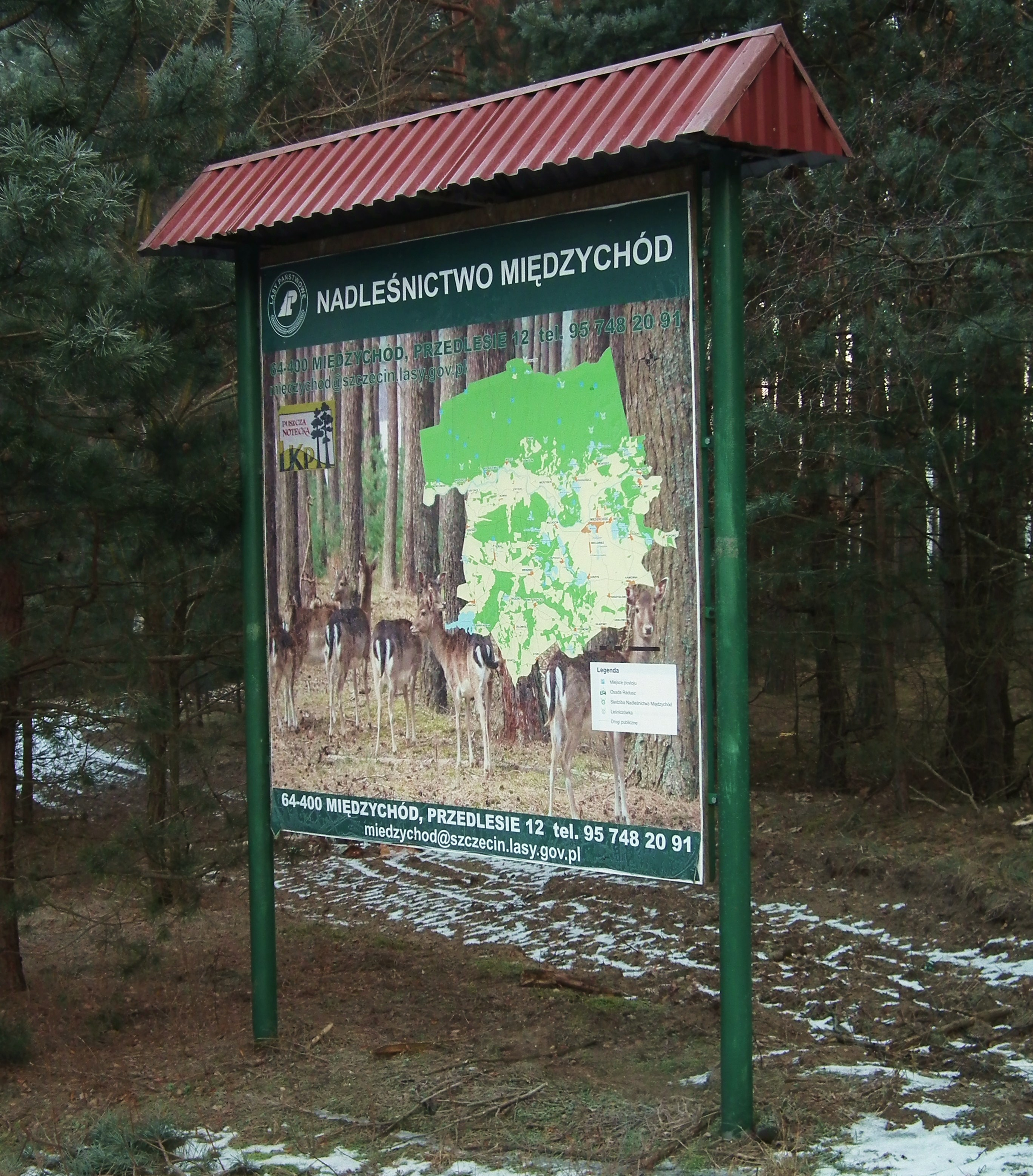 Tablica leśna w Sowiej Górze.